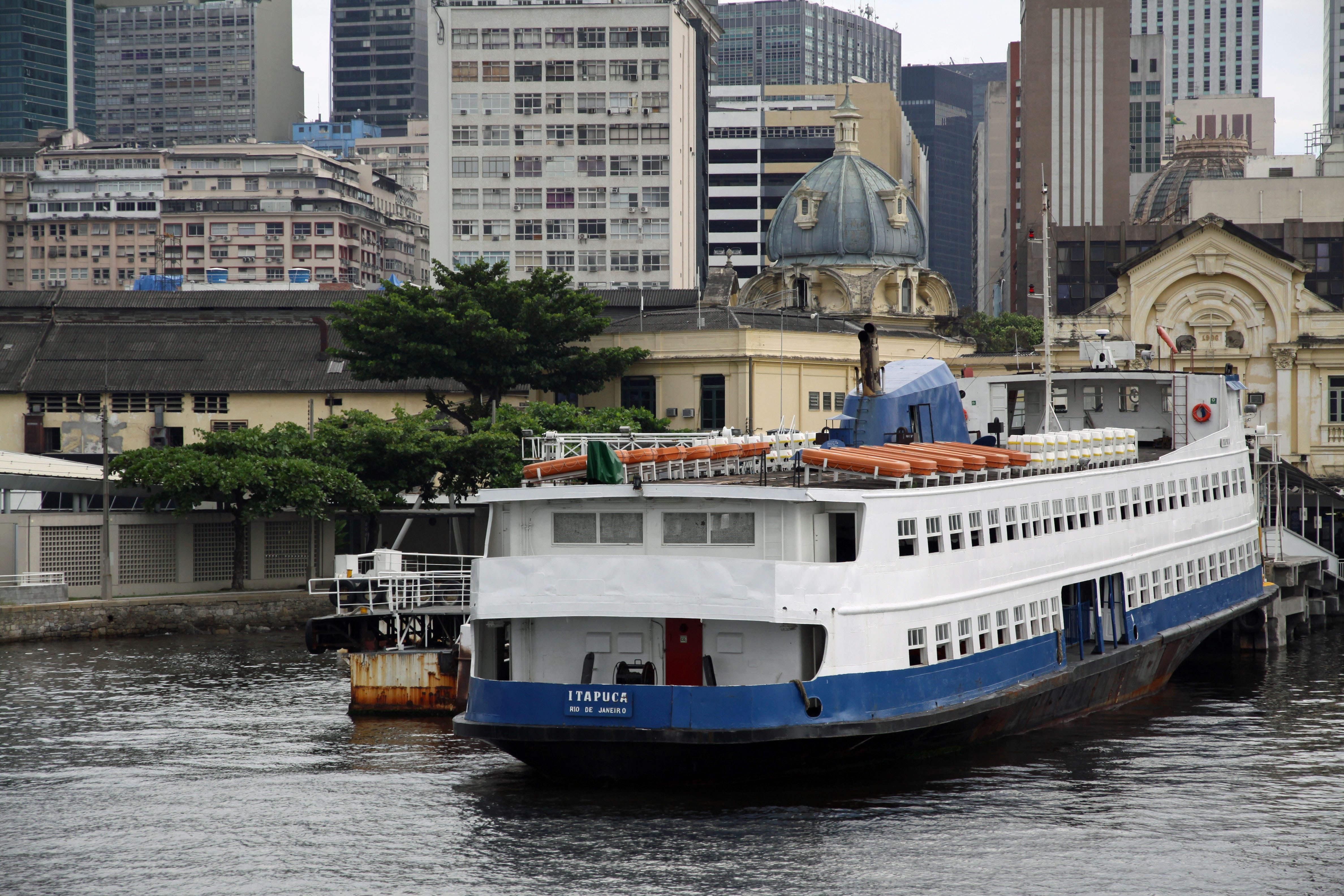 Barca Itapuca atracada no cais da Praça XV de Novembro